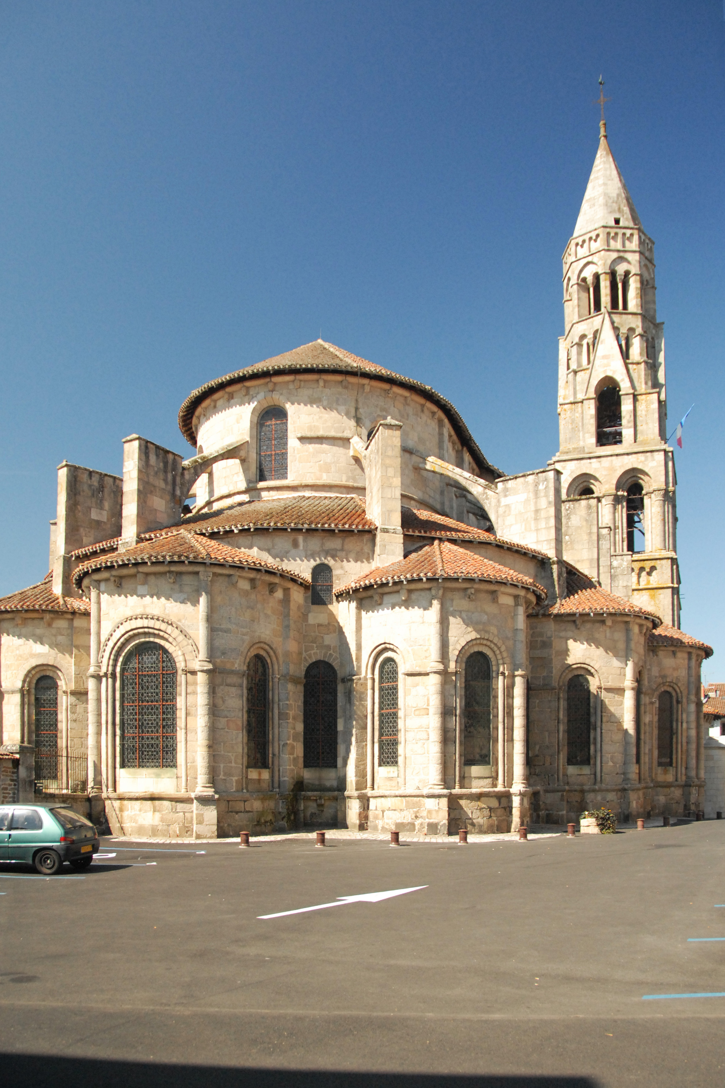 Stiftskirche St.-Léonard-de-Noblat, von O, Chorhaupt u. Turm